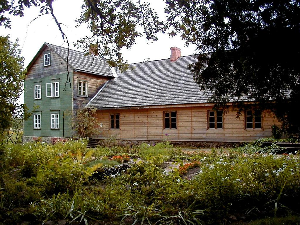 Kalāči - E. Veidenbauma muzejs pie Liepas 2001-09-02